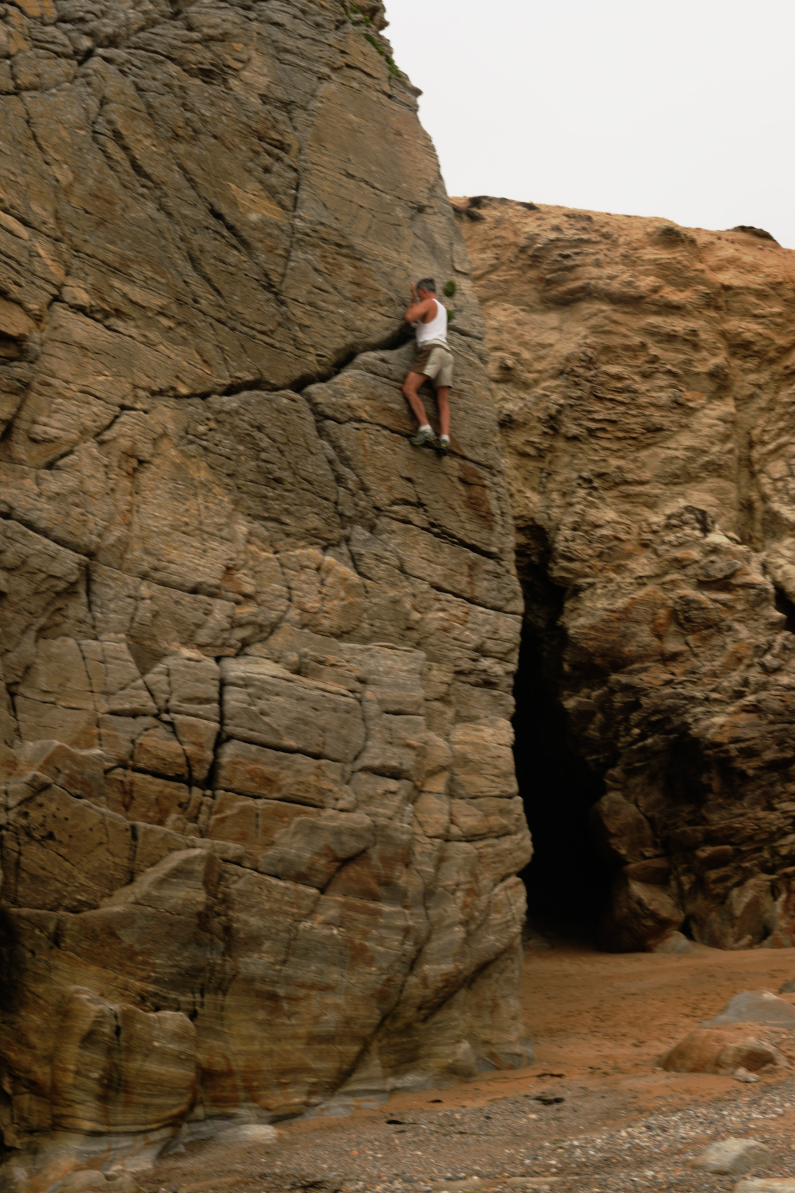 Arche de la Côte Sauvage de Quiberon